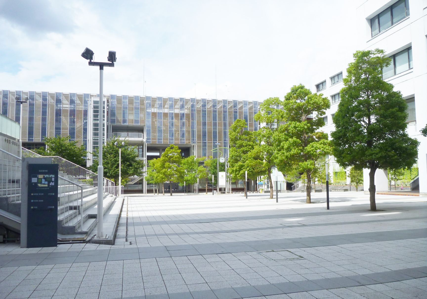 大東文化大学板橋キャンパス 3号館方面を見渡す。